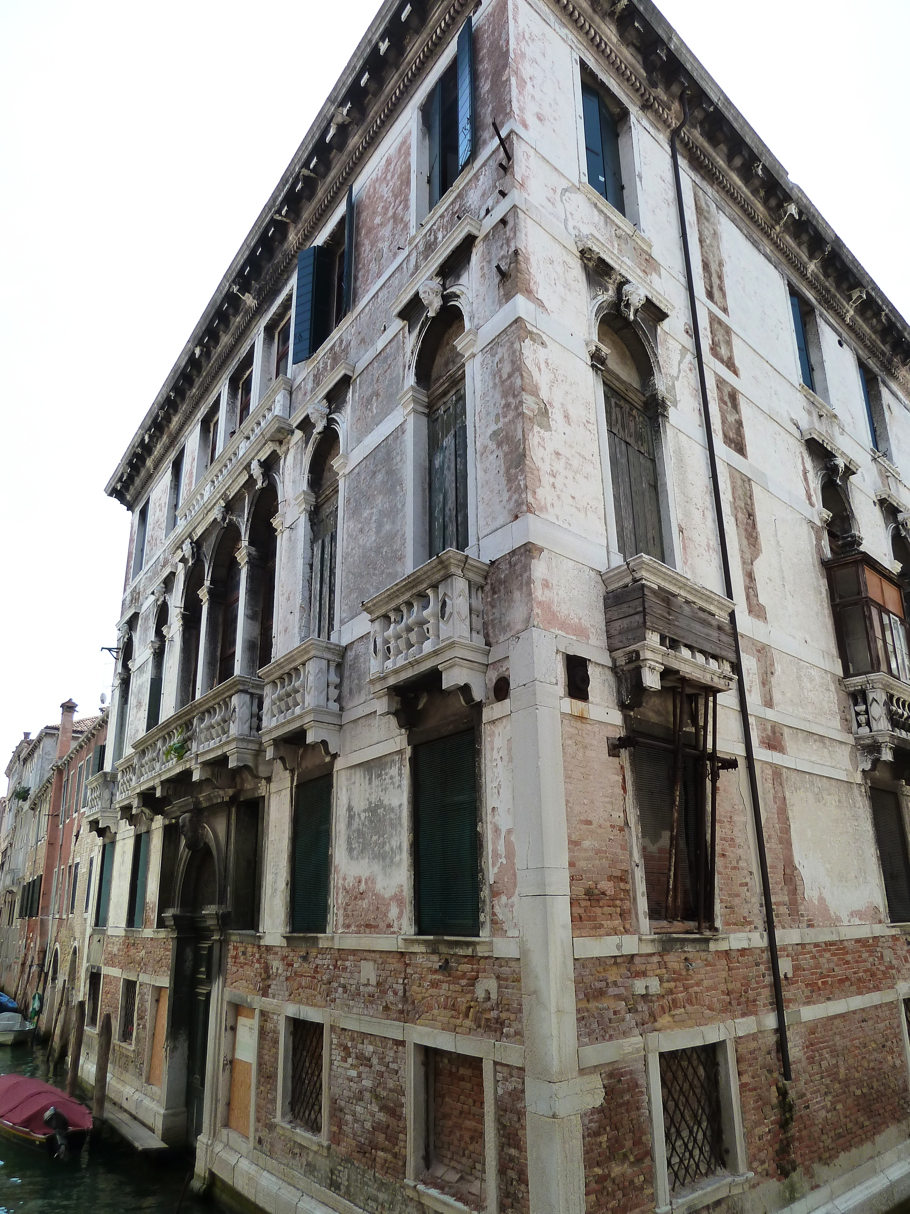 Pal cavagnis